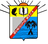 Escudo del municipio Mejía, estado Sucre, Venezuela